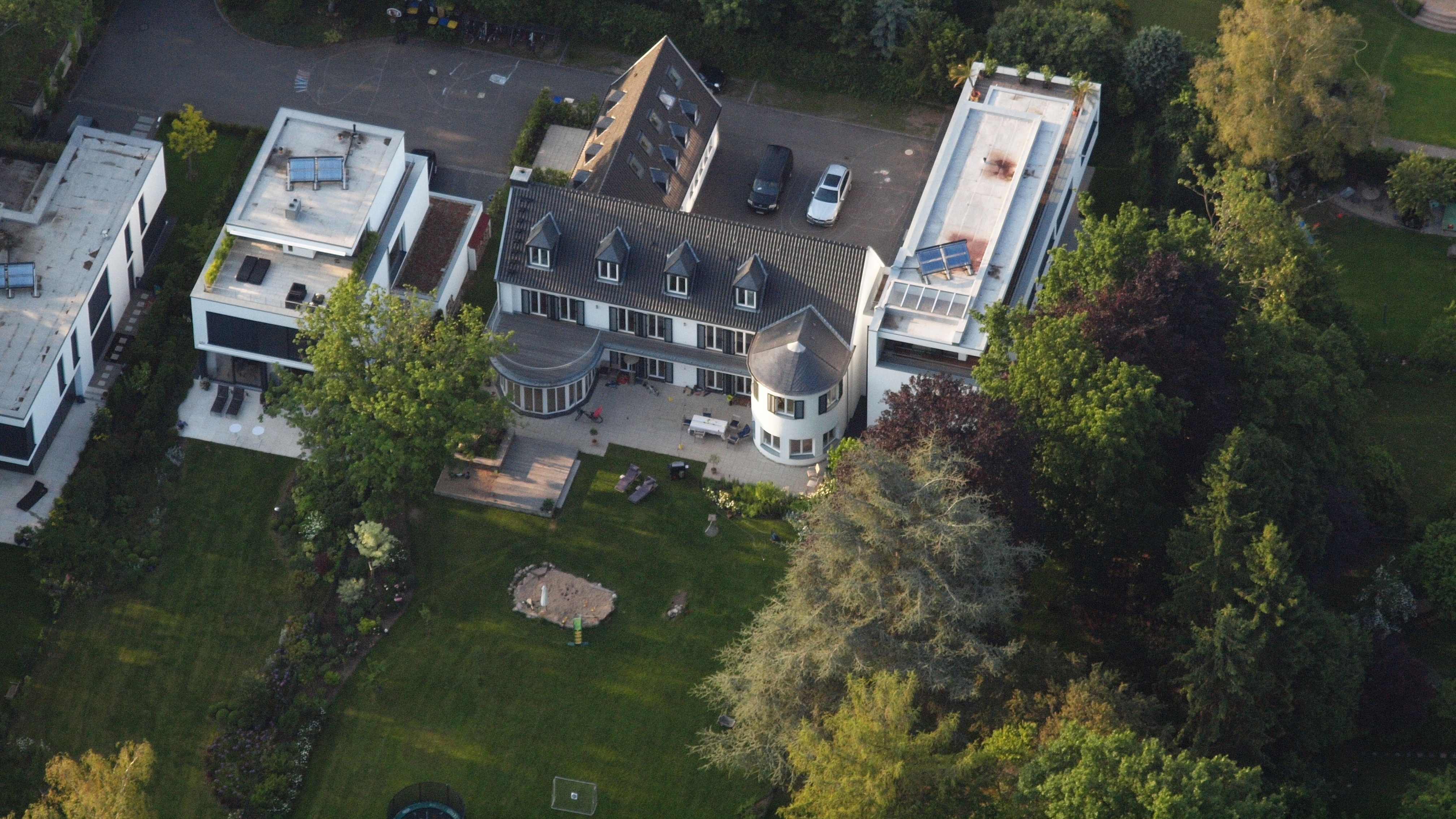 Ehemalige Dienstvilla Willy Brandts, Kiefernweg 12, Bonn-Venusberg: Luftaufnahme (2014)